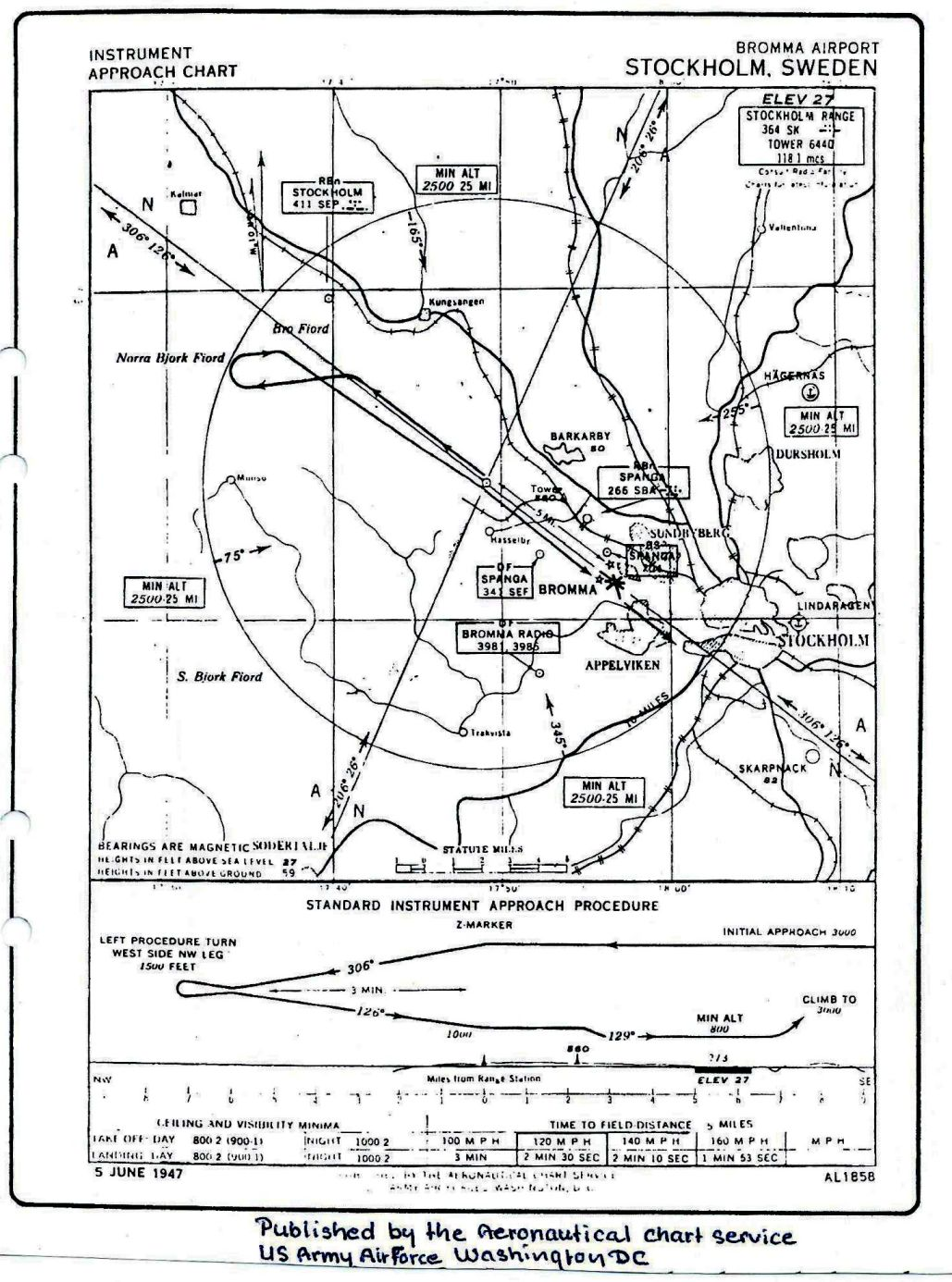 LFR-lähestymiskartta Bromma 1946